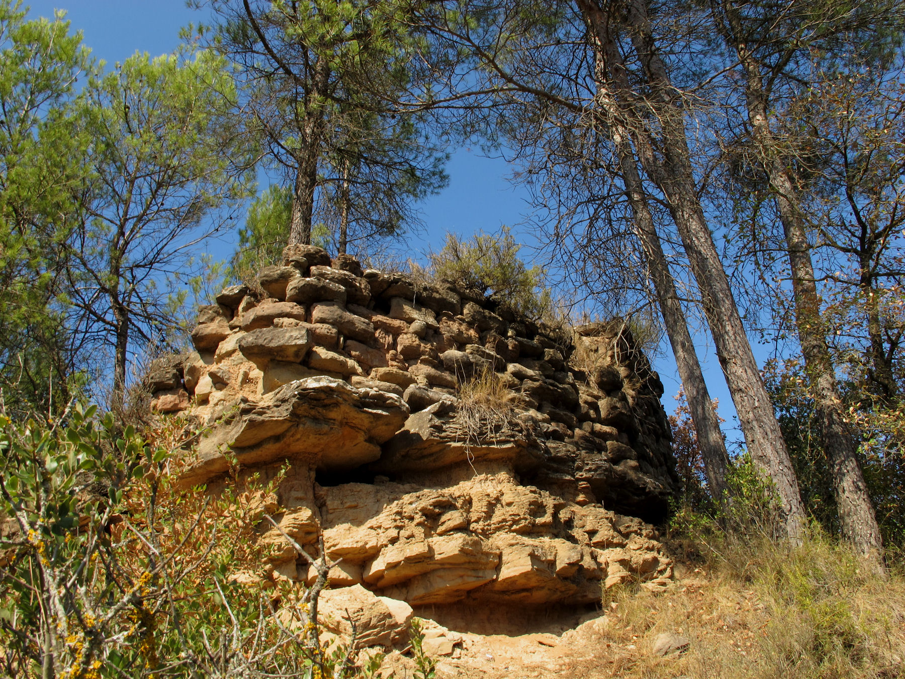 Castell de Cornet - El Castellet - Sallent